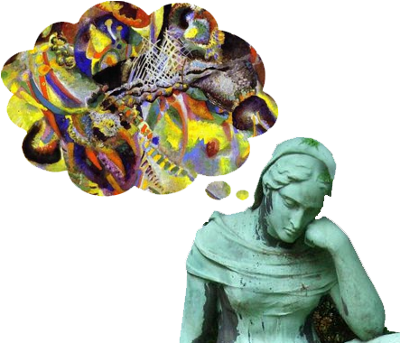 Familiengrab des Otto Schurig 1874-1920, Spitzenfabrikant in Plauen, mit einer Trauernden von der WMF, Friedhof I in Plauen